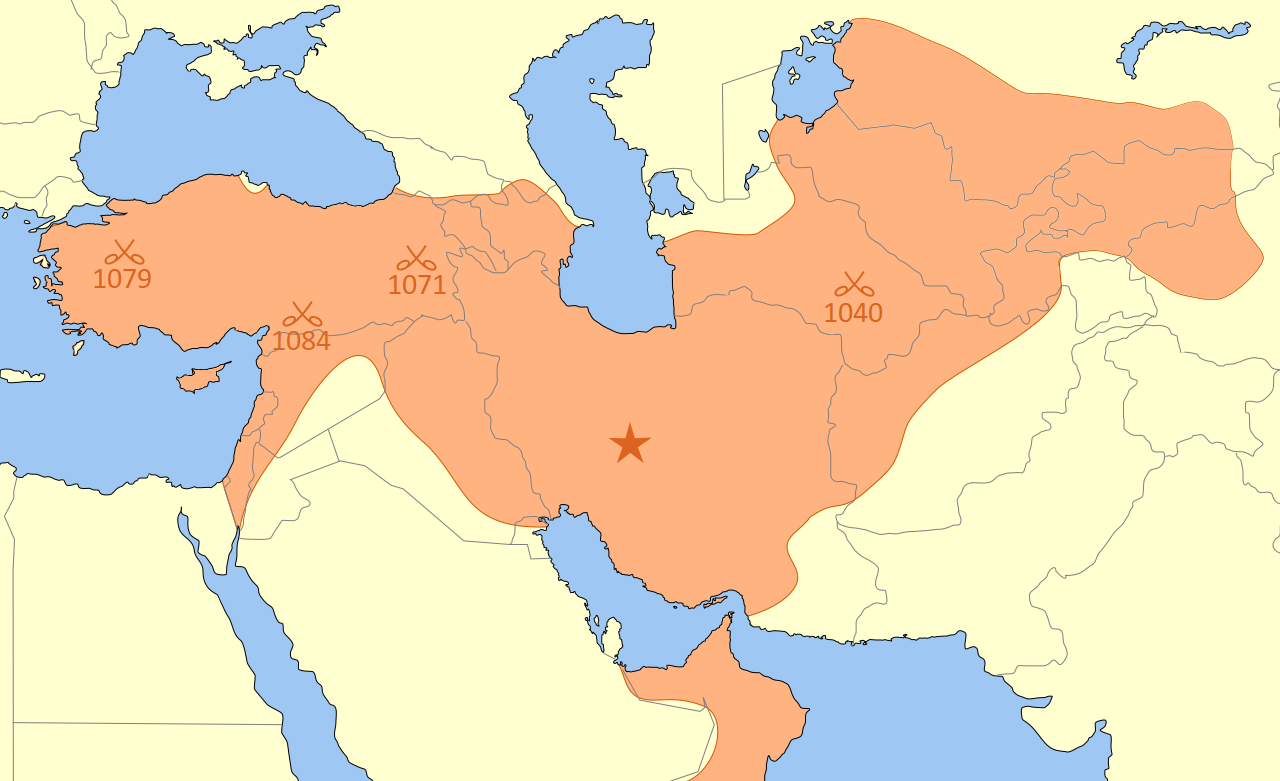 این پرونده قلمرو سلجوقیان از شرق تا غرب در زمان سلطان ملکشاه سلجوقی نشان می دهد.